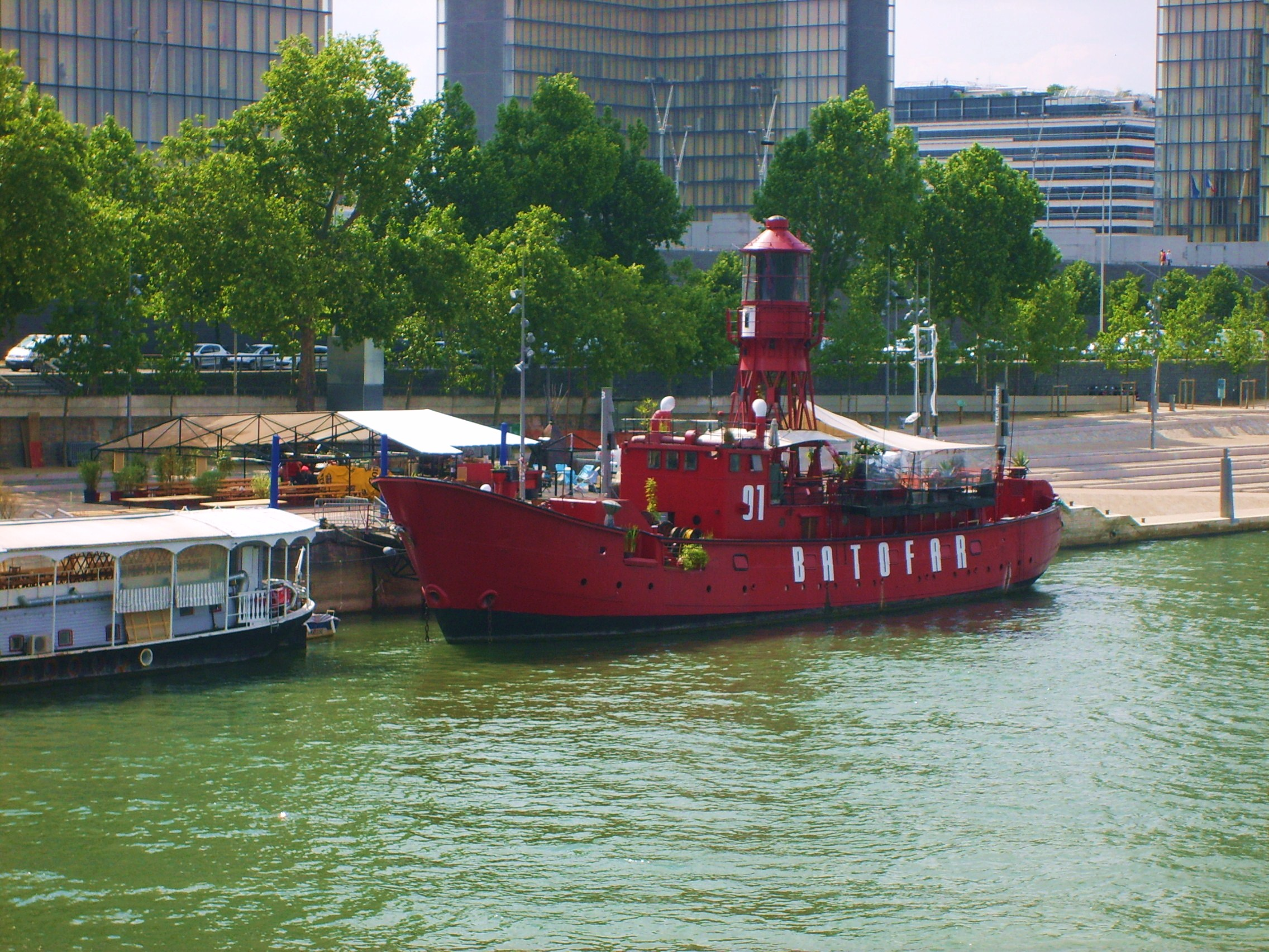 Batofar amarré au quai de la Gare à Paris